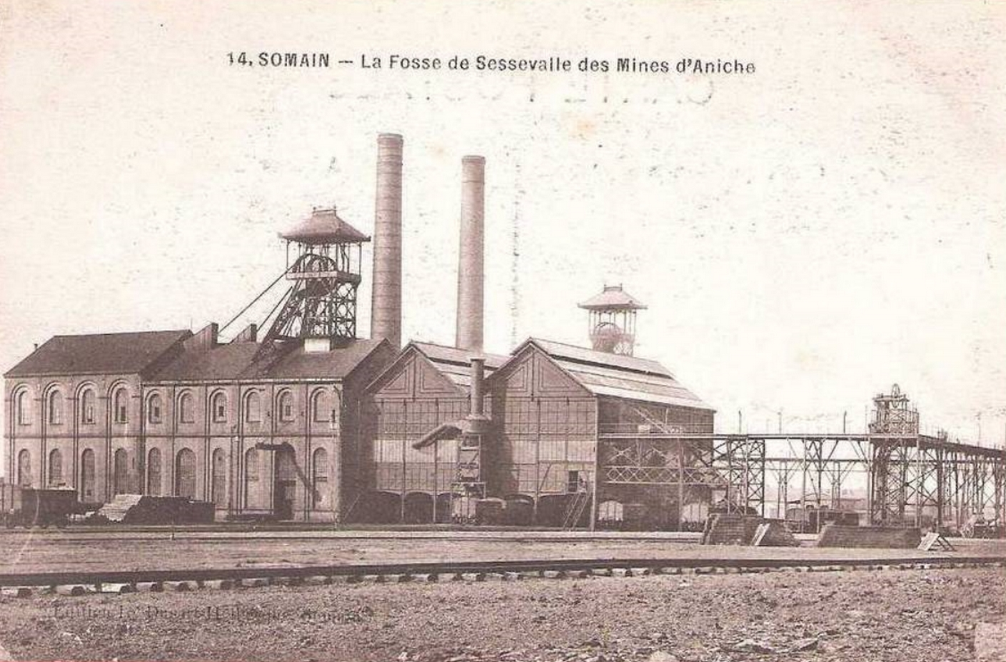 La fosse De Sessevalle était une mine souterraine de houille exploitée par la Compagnie des mines d'Aniche, puis par le Groupe de Douai au nord de Somain, près de Rieulay, dans le bassin minier du Nord-Pas-de-Calais, en France.